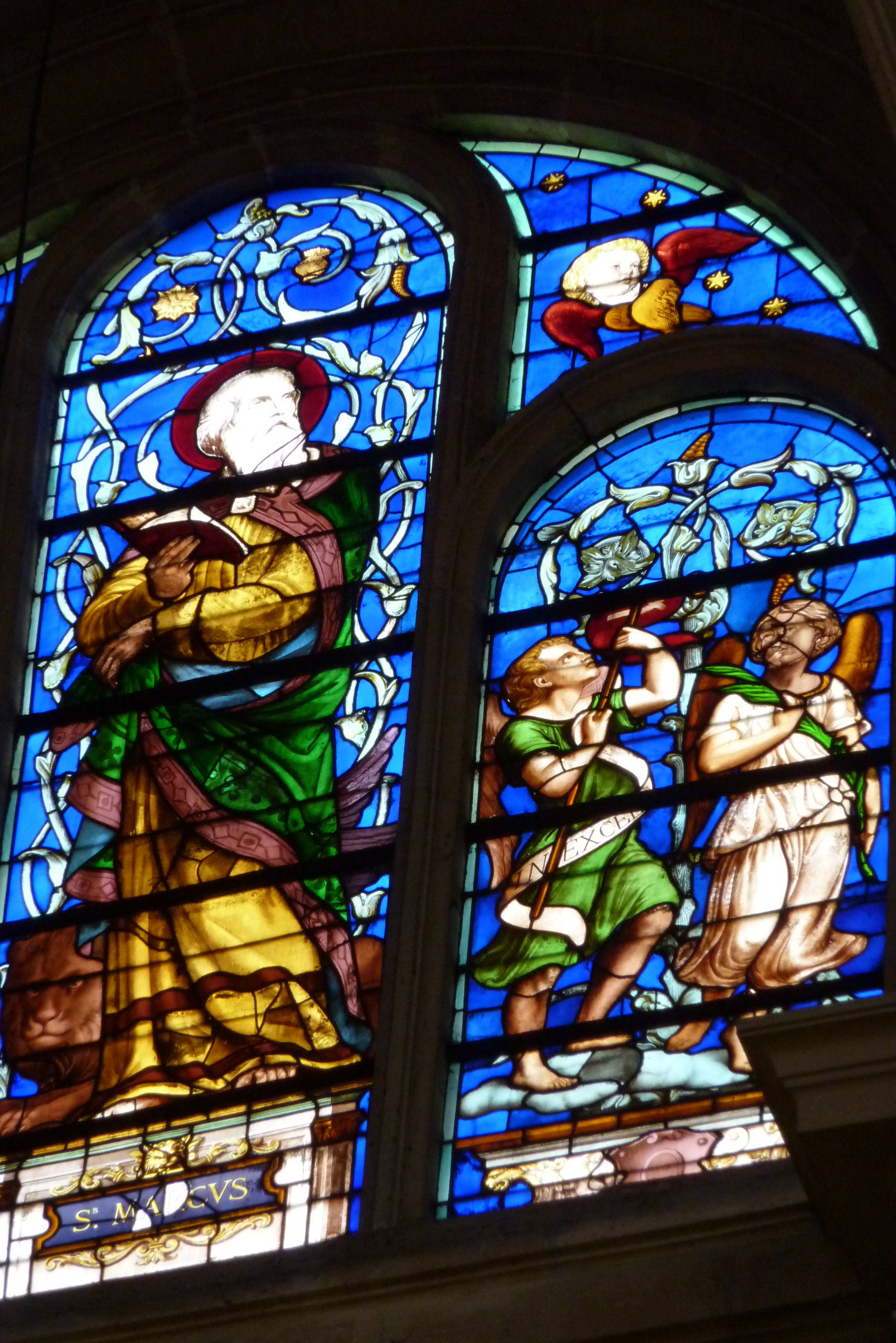 Ausschnitt eines Bleiglasfensters in der Pfarrkirche Saint-Leu-Saint-Gilles in Paris (1. Arrondissement), oberes Chorfenster nach einem Entwurf von Jean-Paul Balze, Ausführung: Paul Nicod (siehe Aline Dumoulin, Alexandra Ardisson, Jérôme Maingard, Murielle Antonello: Paris. D'Église en Église. Éditions Massin, Paris 2008, S. 27, ISBN 978-2-7072-0583-4); Darstellung: Evangelist Markus